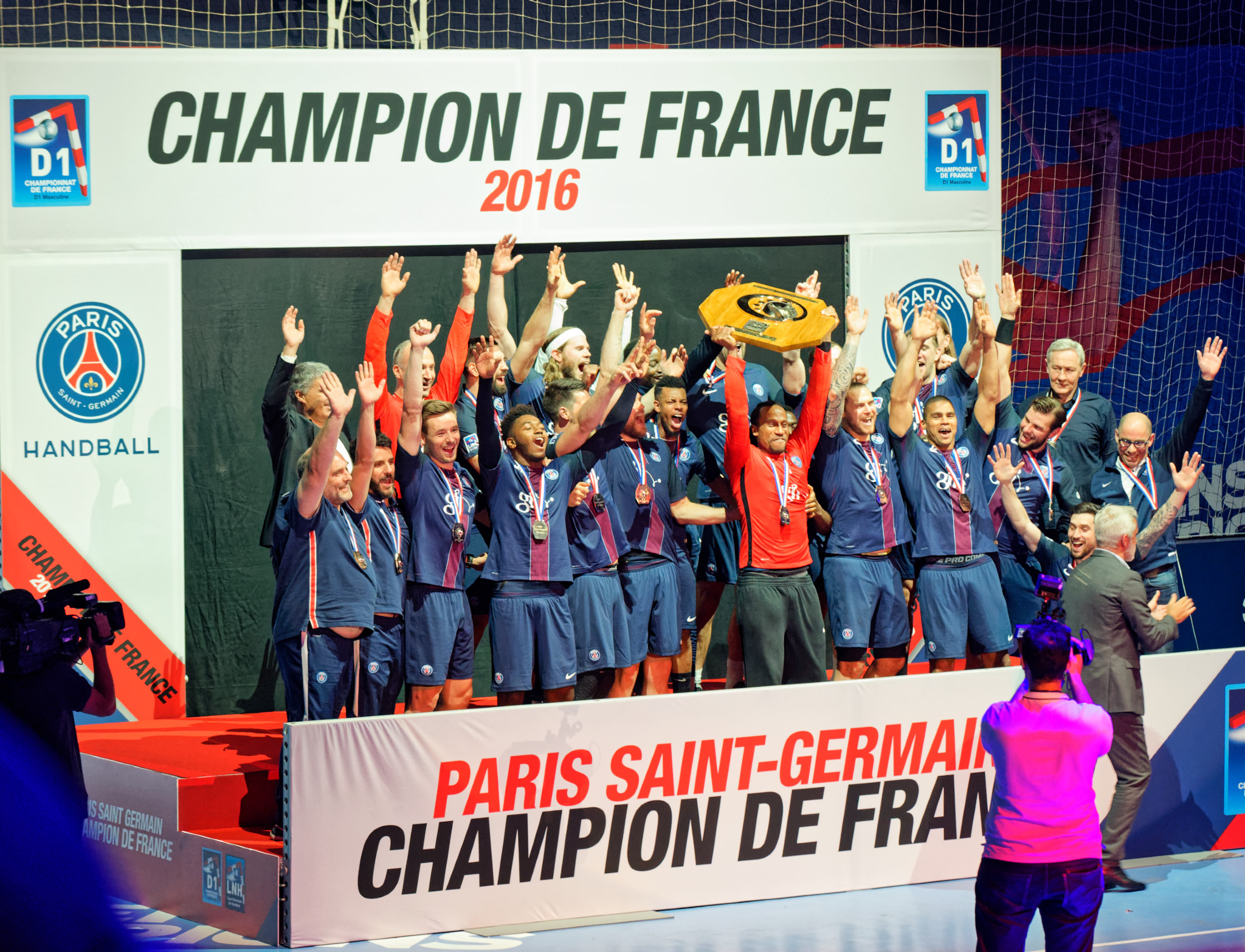 Rencontre de championnat entre le PSG et Pays d'Aix handball. A Coubertin, le 2 juin 2016.